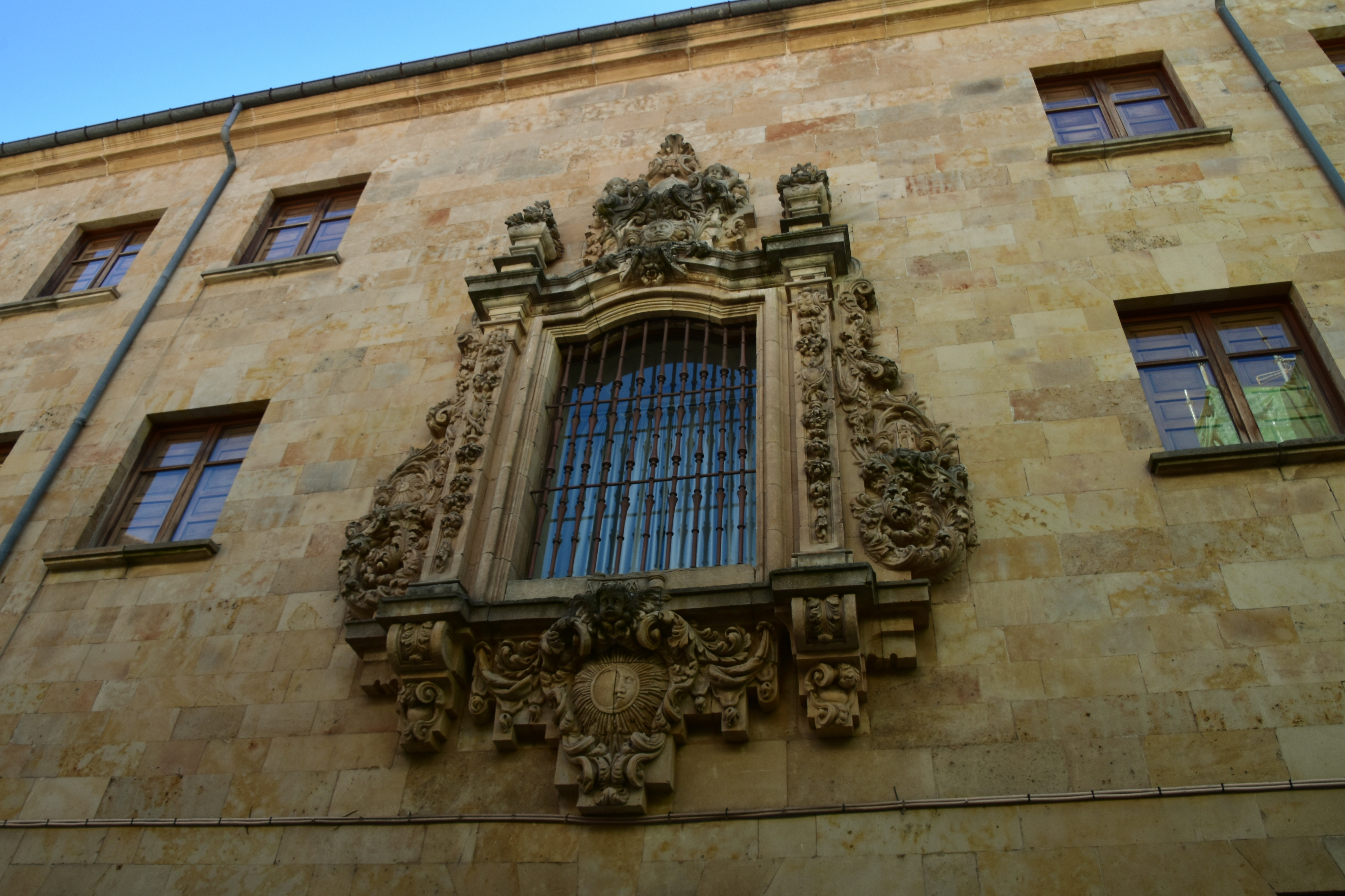 Old Salamanca (8)